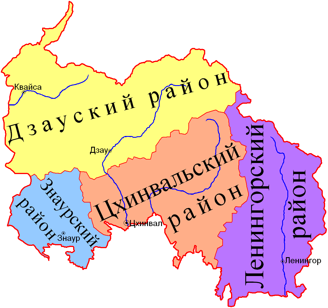 Administrative divisions of South Ossetia